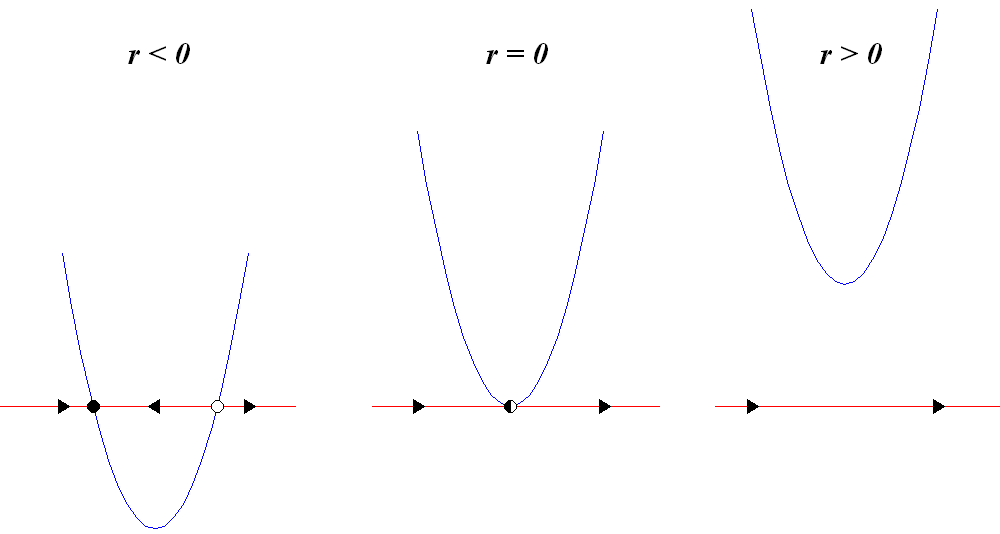 Saddle node